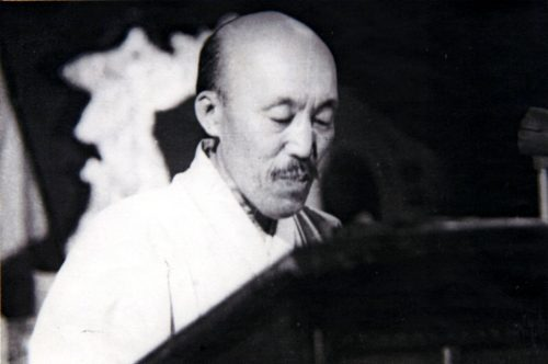 남북연석회의에 축사를 낭독하는 홍명희, 1948.04.05